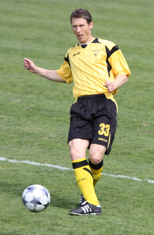 Tomas Ražanauskas